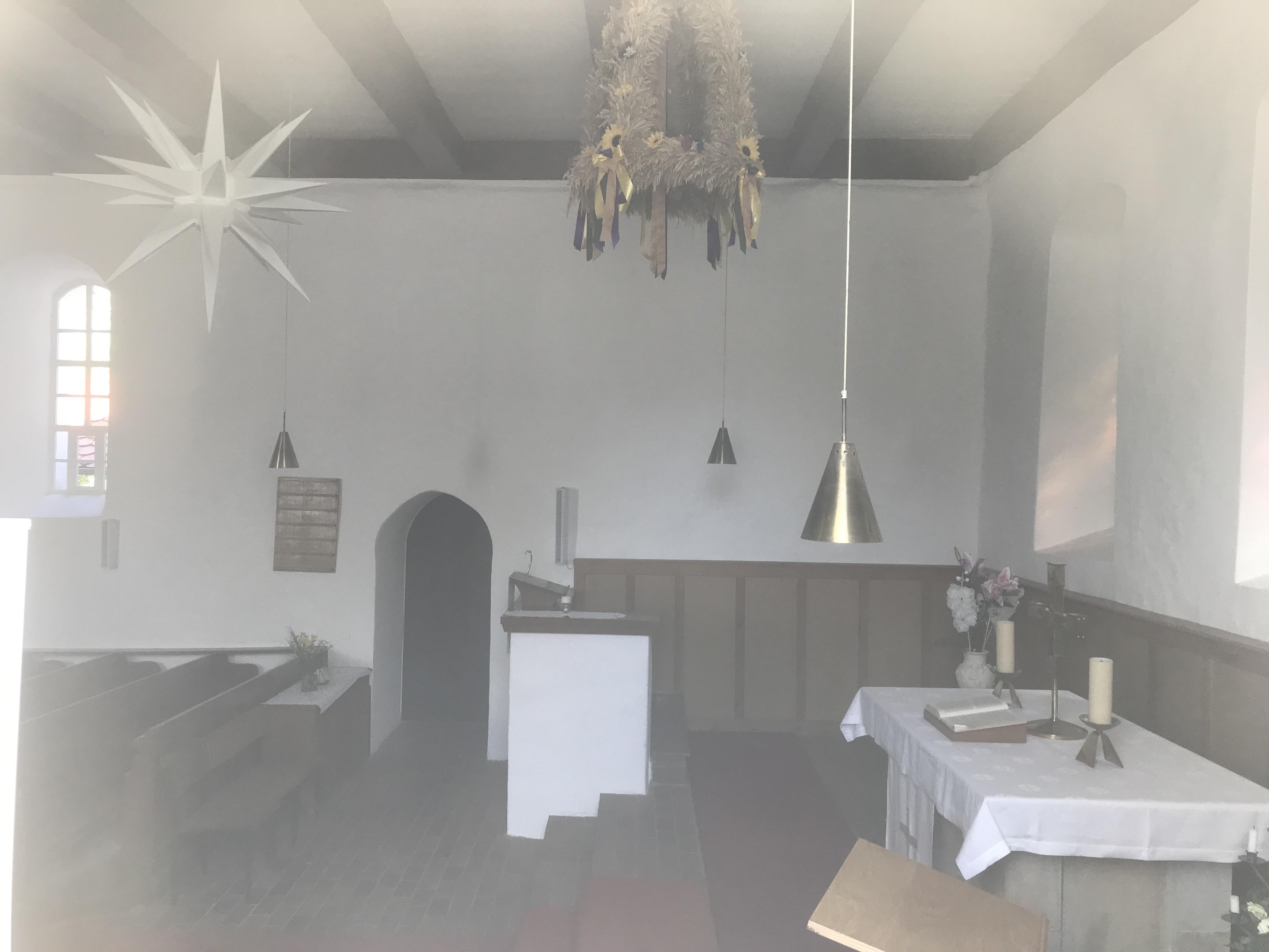 Die Dorfkirche Pillgram im gleichnamigen Ortsteil der Gemeinde Jacobsdorf im Landkreis Oder-Spree ist eine Feldsteinkirche aus dem Mittelalter. Die Kirchenausstattung ist neuzeitlich aus den 1950er Jahren.